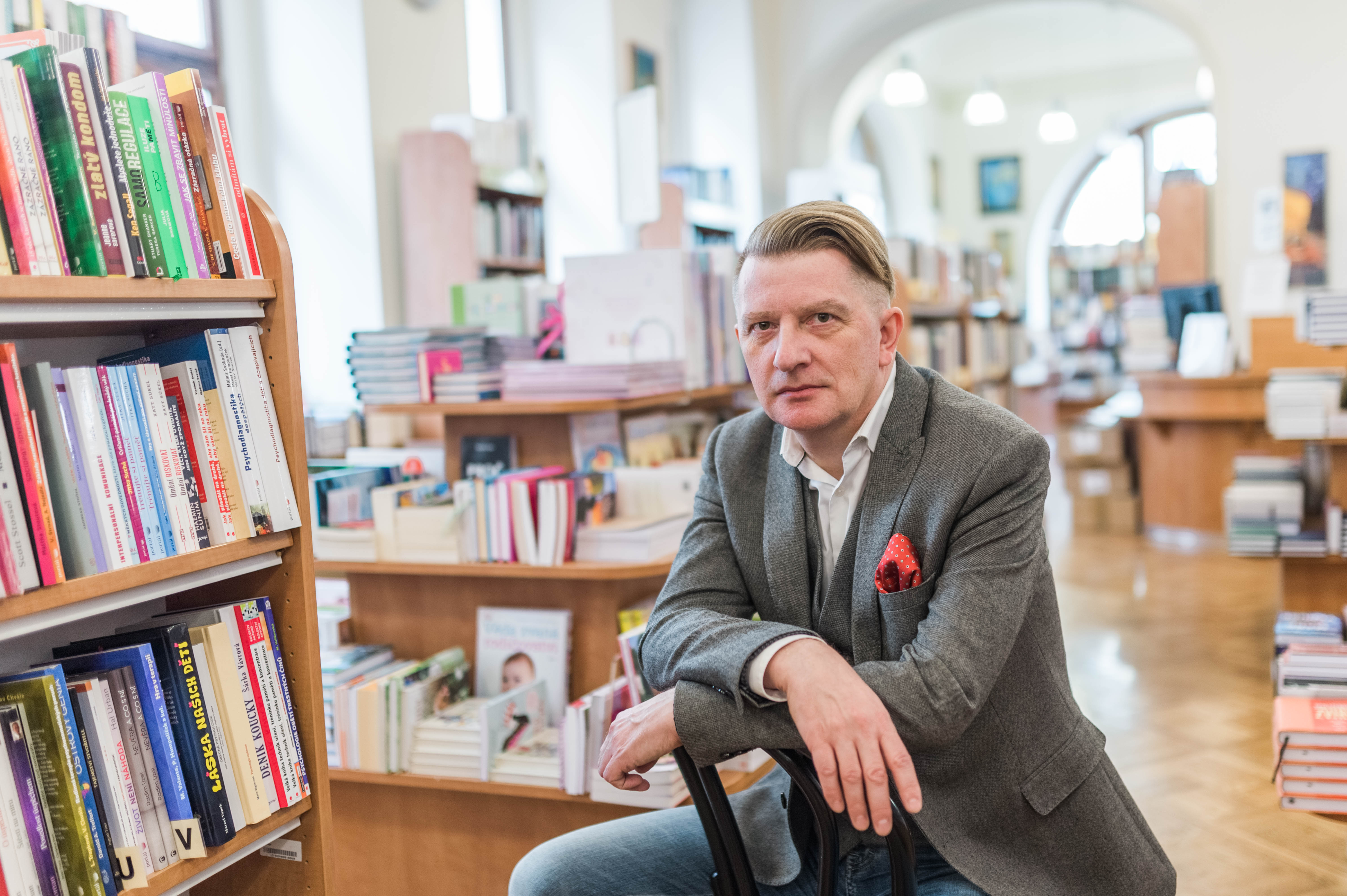 Jiří Padevět (* 20. července 1966 Praha) je český spisovatel, knihkupec a nakladatel. V roce 2014 získal cenu Magnesia Litera za knihu Průvodce protektorátní Prahou. Za stejnou publikaci obdržel i ocenění Slovník roku 2013.